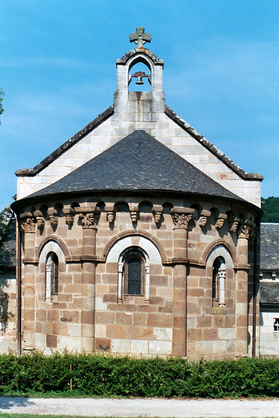 France - Auvergne - Cantal - Église Saint-Georges d'Ydes-Bourg